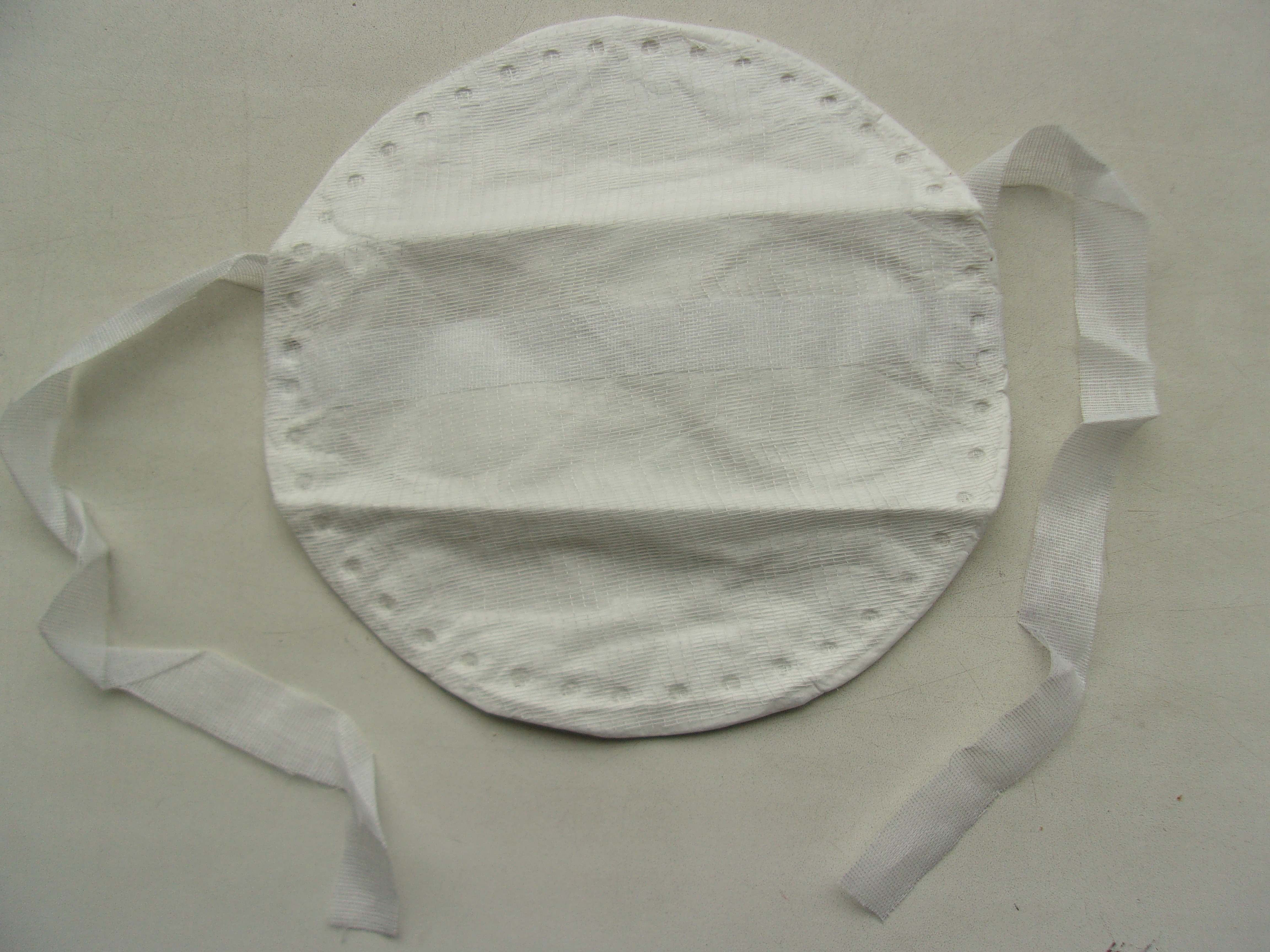 Фильтрующая полумаска Лепесток-200, предназначена для защиты от пыли аэрозолей, производится с небольшими модификациями с 1957г, выпущено более 6 млрд шт. Число 200 в названии означает декларируемую эффективность - изделие якобы снижает концентрацию мелкодисперсной пыли (наиболее плохоулавливаемой) минимум в 200 раз. Это не подтверждается результатами независимых испытаний как в лабораторных, так и в производственных условиях; а применение подобных СИЗОД ограничено научно-обоснованным национальным законодательством в США - не более 10 ПДКрз. См. Респираторы ШБ Лепесток. Хотя изделие сертифицировано после принятия ГОСТ 12.4.191, на нём отсутствует маркировка (название модели, класс защиты, изготовитель).